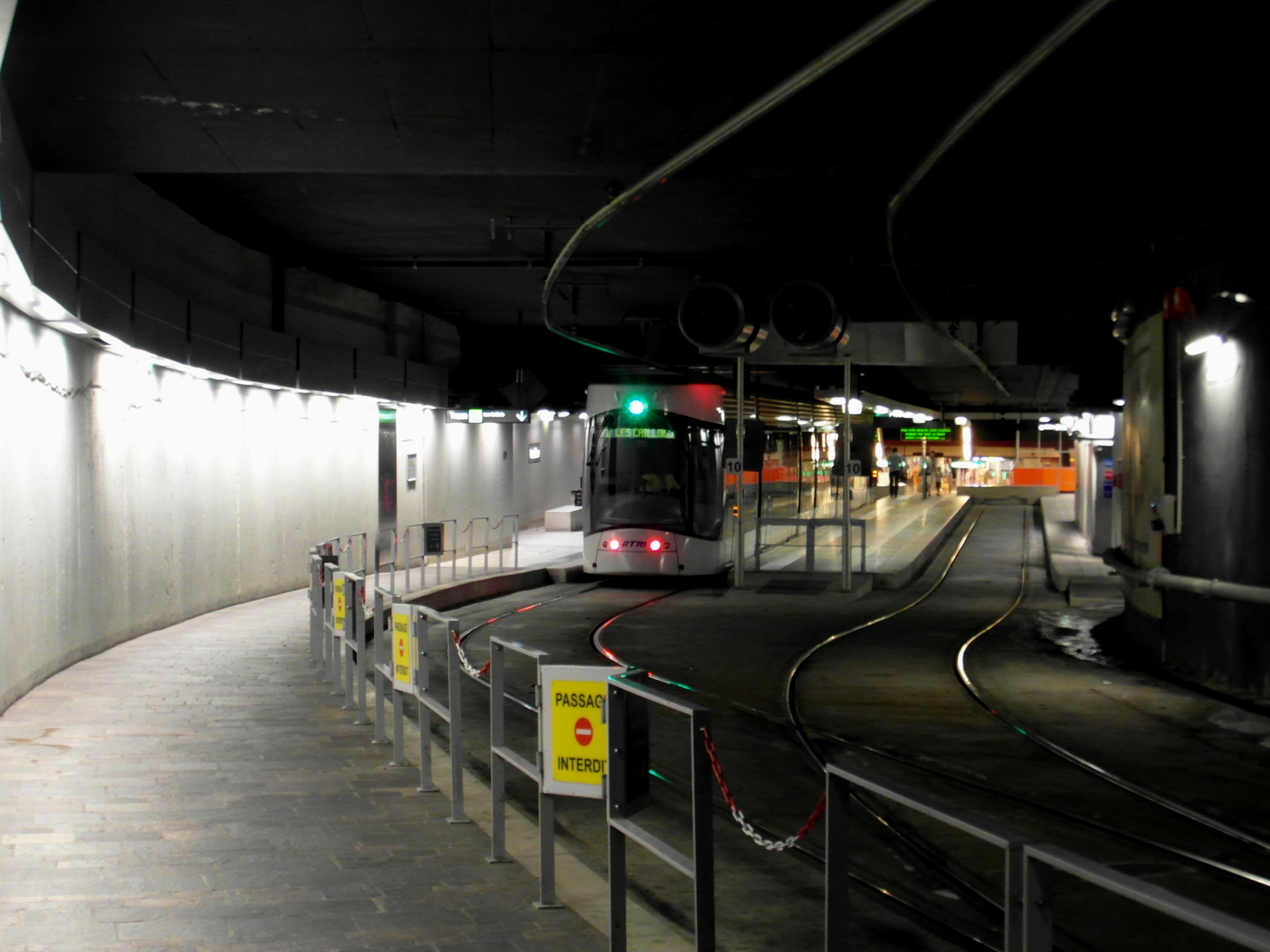 Marseille - Métro & Tramway - Noailles